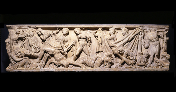 Sarcófago de Husillos (Cultura Romana). Número de inventario: 2839.